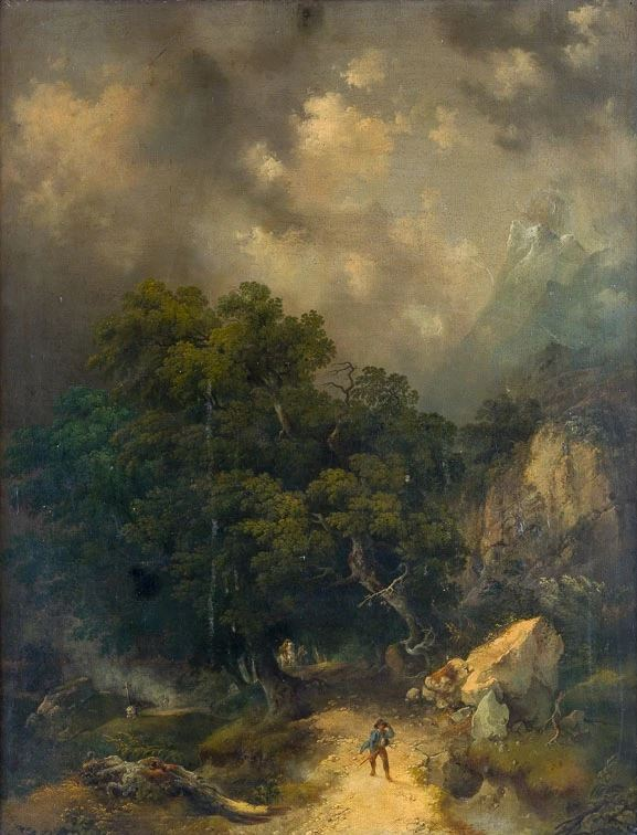 "Nell'Appennino", olio su tela, 83 × 65.5 cm., coll. privata